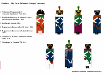 Realistas Cuerpos Veteranos Alto Perú 1811 - 1821